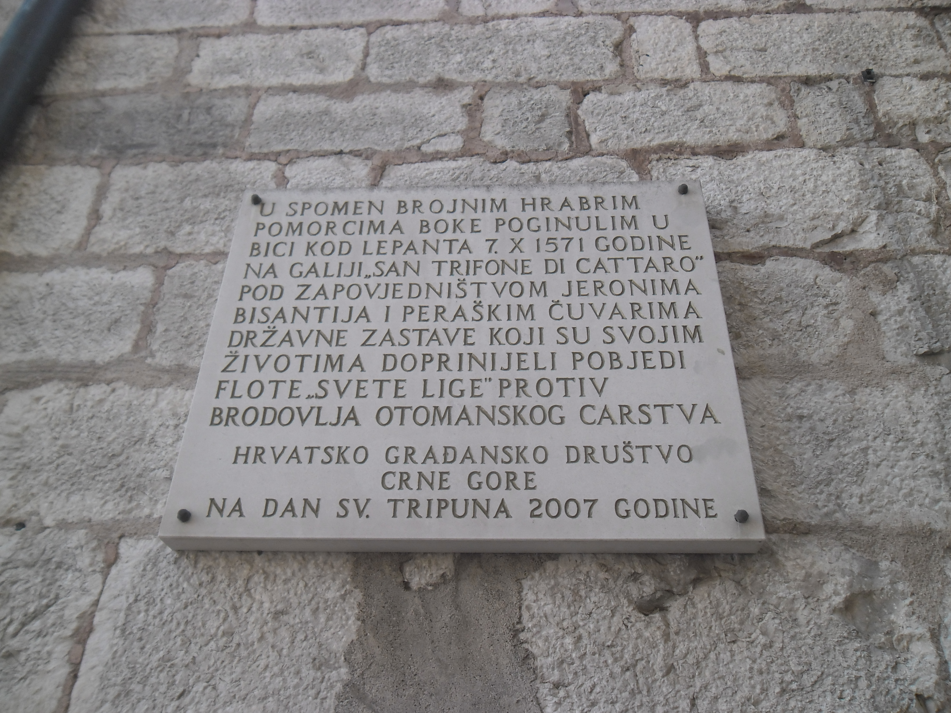 Kotor